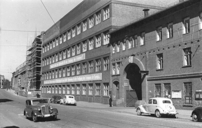 Magdeburg, SAG Schwermaschinenbau Zentralbild Biscan 18.9.1953 Der Schwermaschinenbau "Karl Liebknecht" in Magdeburg -ab 1.1.54 deutsches Eigentum Zu den 33 SAG-Betrieben, die entsprechend dem sowjetisch-deutschen Abkommen in deutsche Hand übergeben werden, gehört die SAG Schwermaschinenbau "Karl Liebknecht" in Magdeburg, das frühere Buckau-Wolf Werk. Das Liebknecht-Werk hat zwei grosse auf das beste eingerichtete Betriebsstätten, ein Werk in Magdeburg-Buckau, eins in Magdeburg-Salbke. Die Erzeugnisse des Liebknecht-Werkes gehen in alle Welt und erfreuen sich überall des besten Rufes, besonders die Dieselmotoren, die Berger, die Schreitbagger und die Kesselanlagen. UBz: Die Strassenfront des Buckauer Betriebes des Karl-Liebknecht-Werkes.